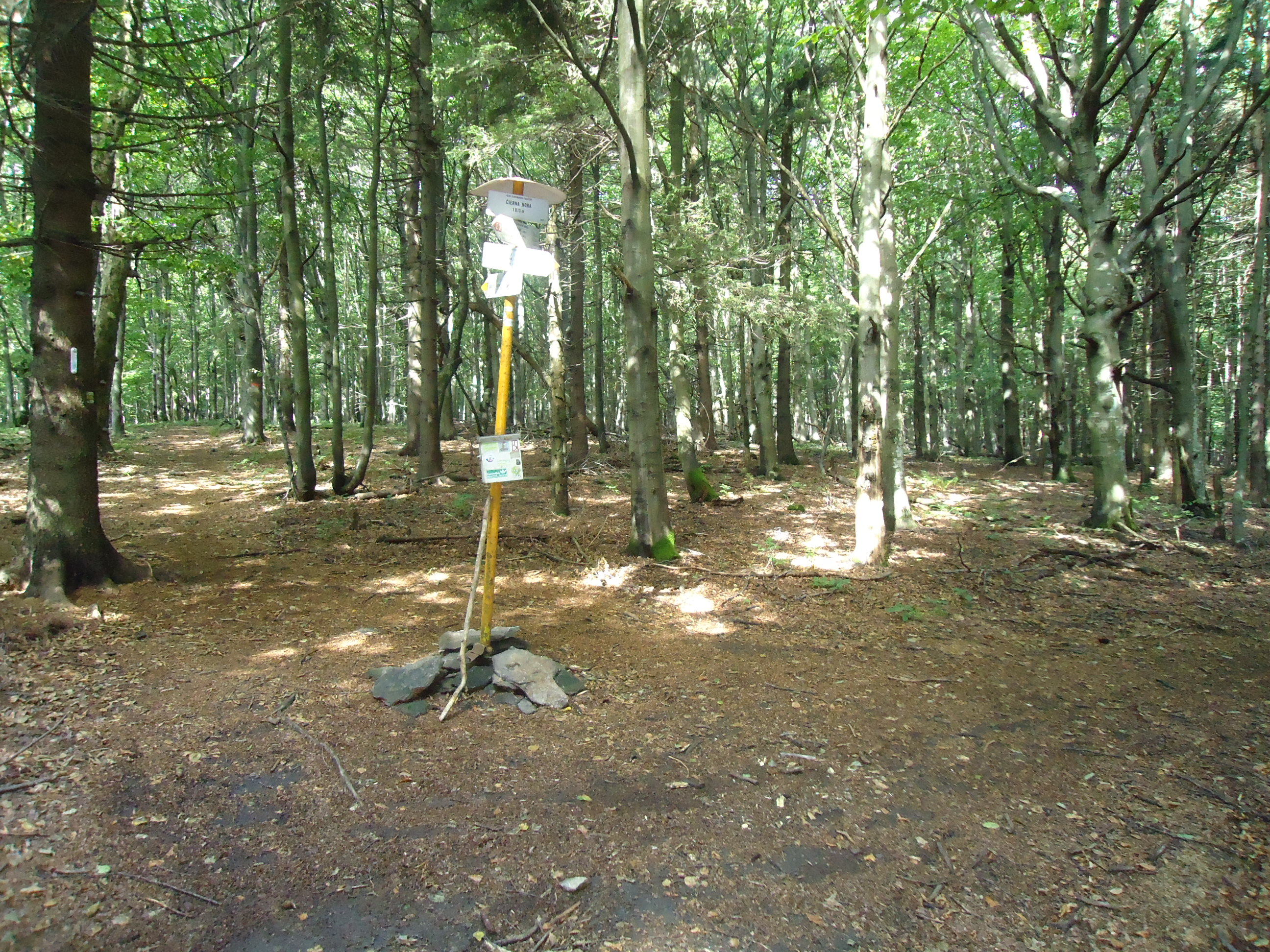 vrchol Čierné hory